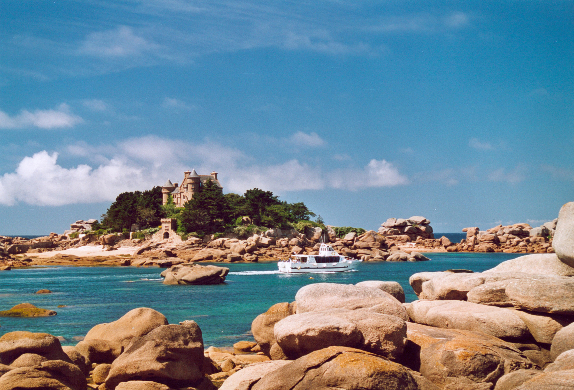 Bretagne la côte de granit rose Auteur : GIRAUD Patrick